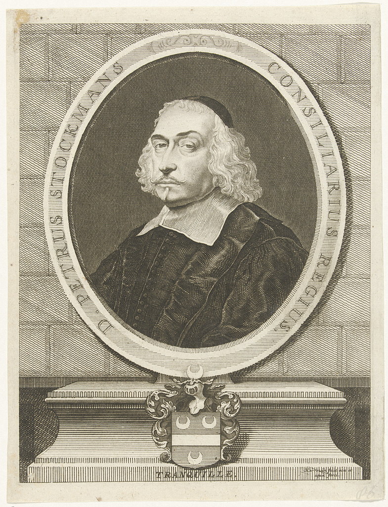 portrait de conseiller de Brabant Pierre Stockmans, gravé par Harrewijn.